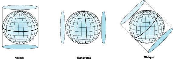 Kaardiprojektsiooni aspektid silindrilise projektsiooni korral: normaal-, põik- ja kaldaspekt. (Allikas: ArcMap 10.3 Guide Book)